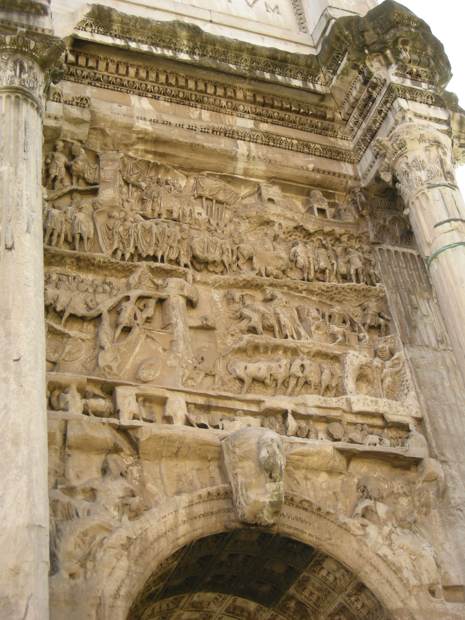 Arco di settimio severo, pannello 04